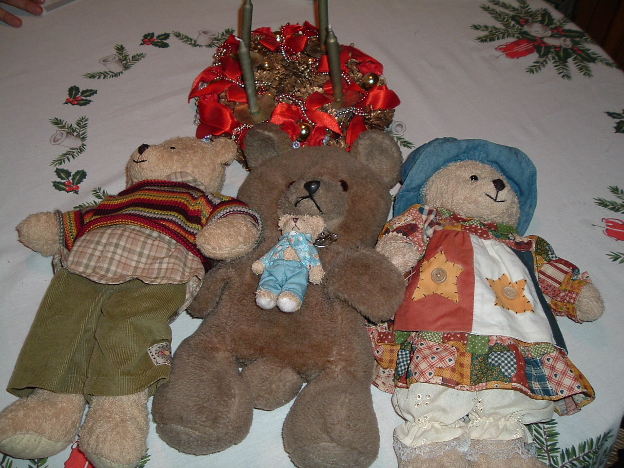 Giocattoli per bambini-bambolotti